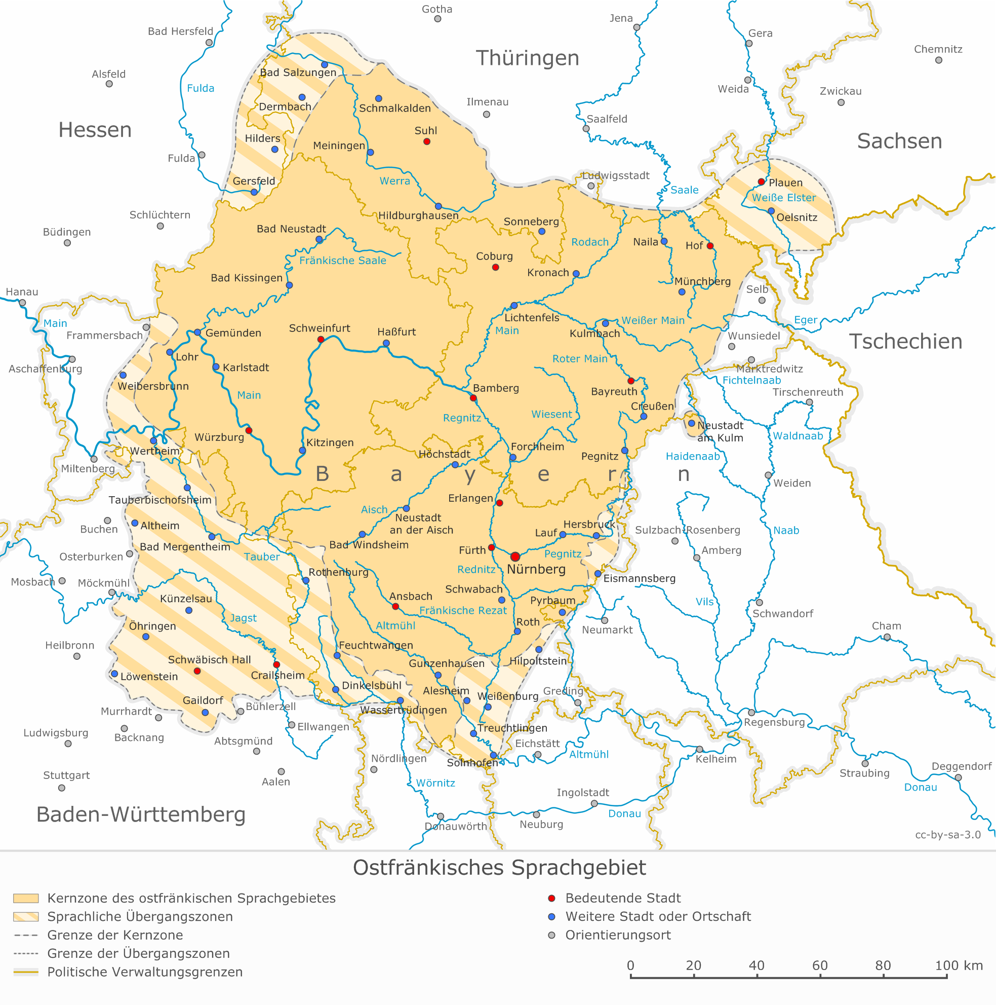 Ostfraenkischer Sprachraum (Version 1.2)